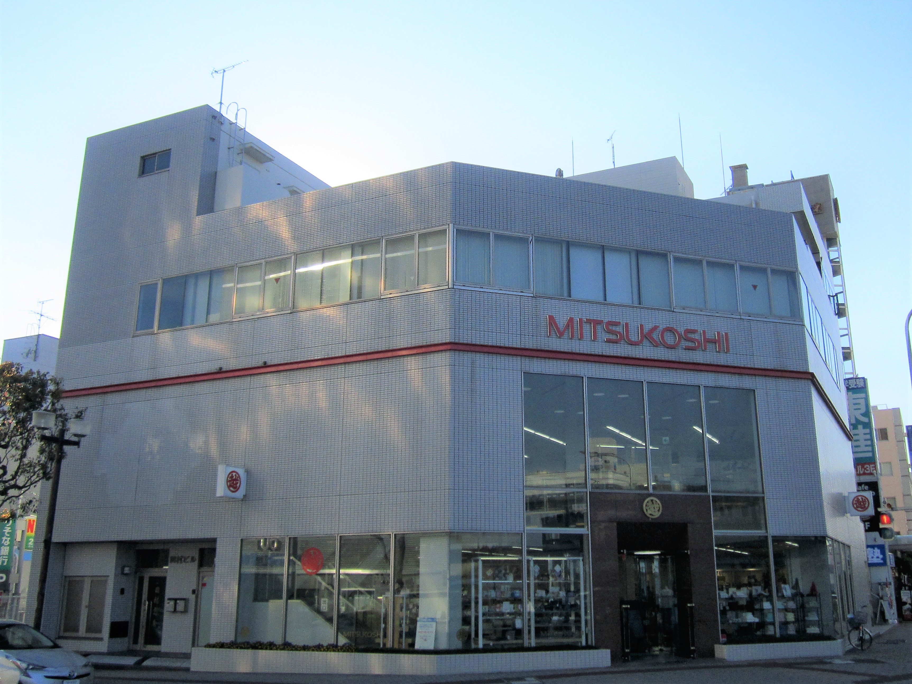 三越茂原（茂原市千代田町） Canon PowerShot A2200